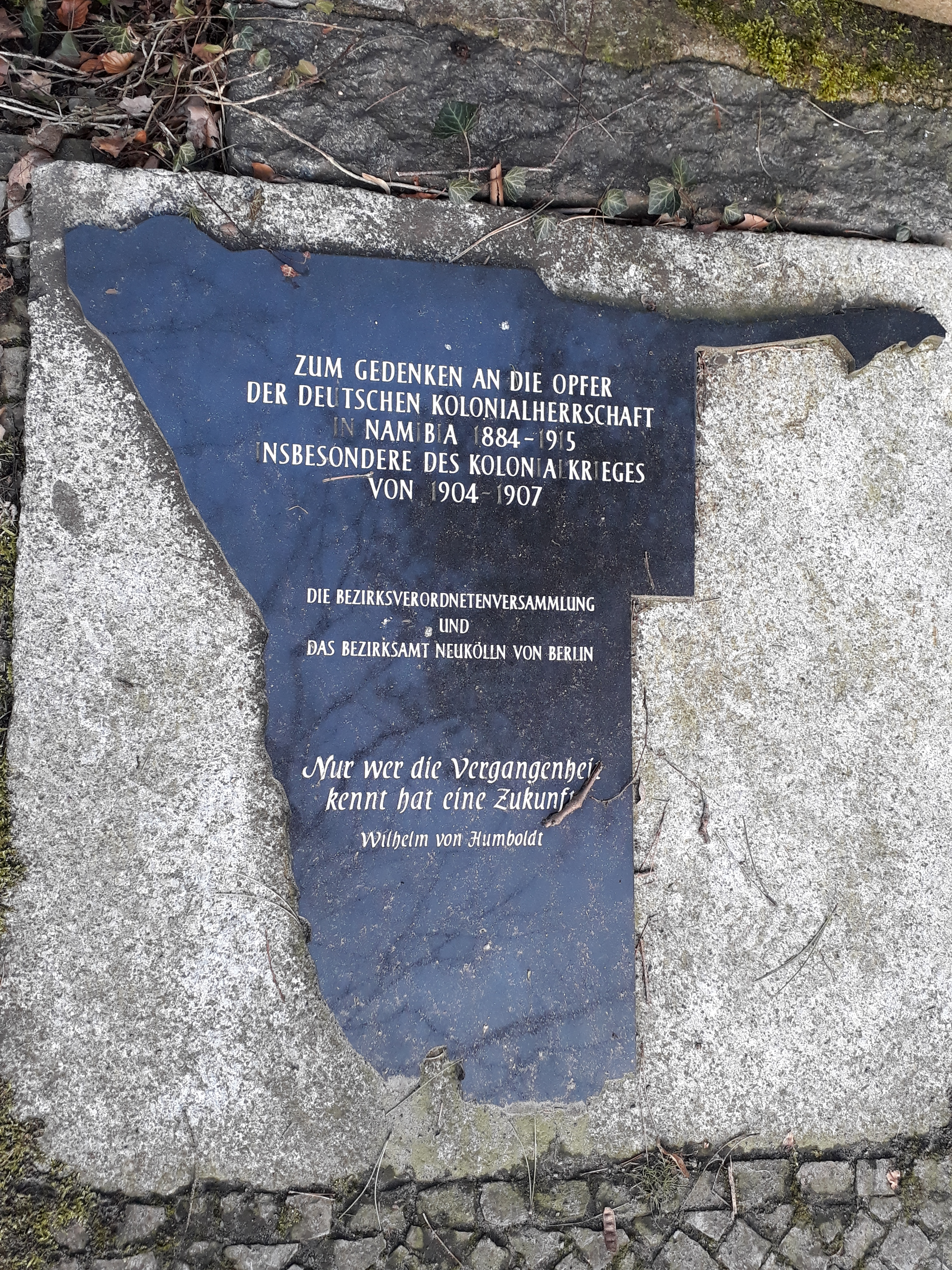 Sogenannter Herero-Stein auf dem Friedhof am Columbiadamm, Berlin